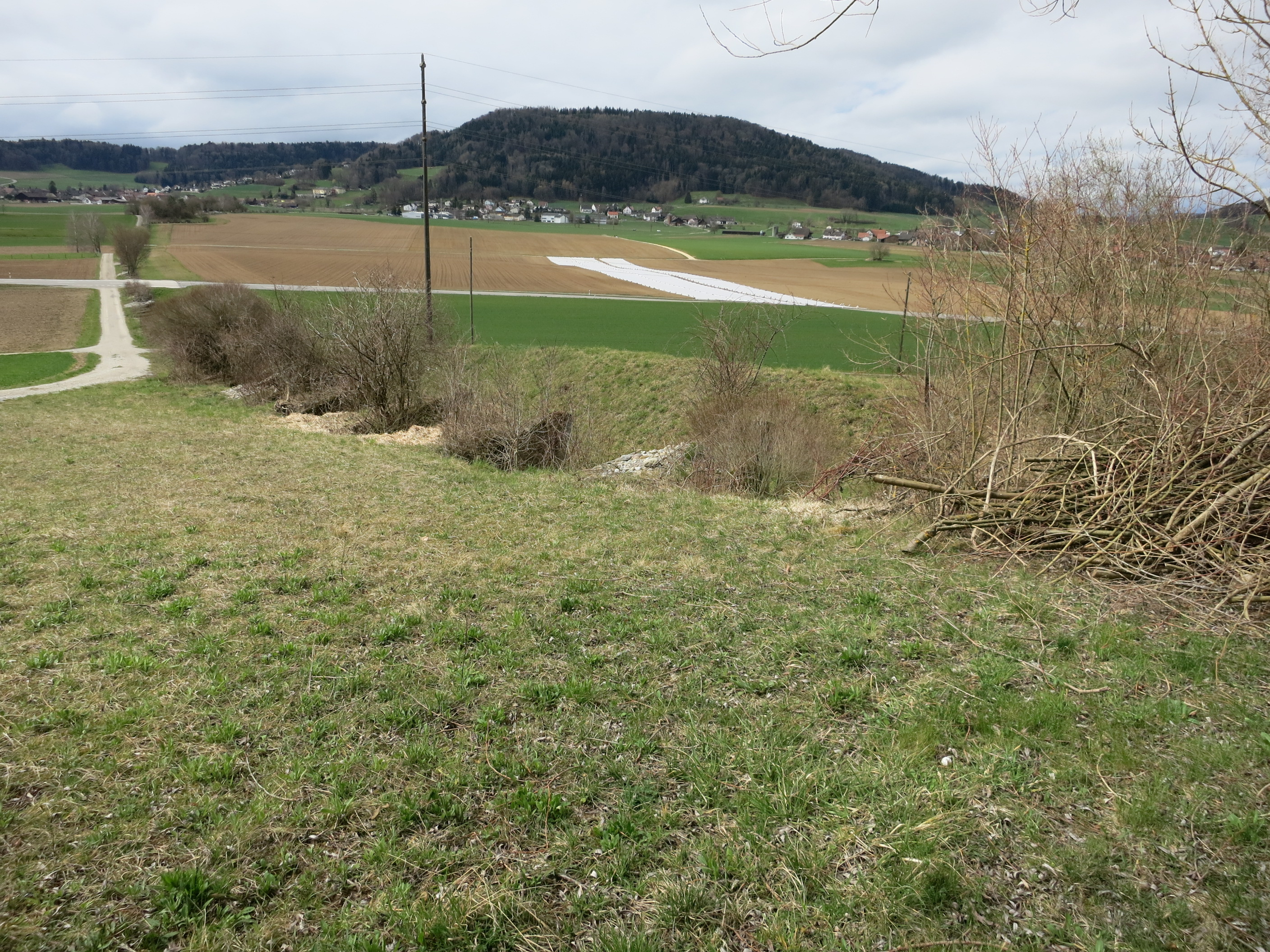 Sperrstelle Stadel, Stadel bei Niederglatt ZH, Schweiz